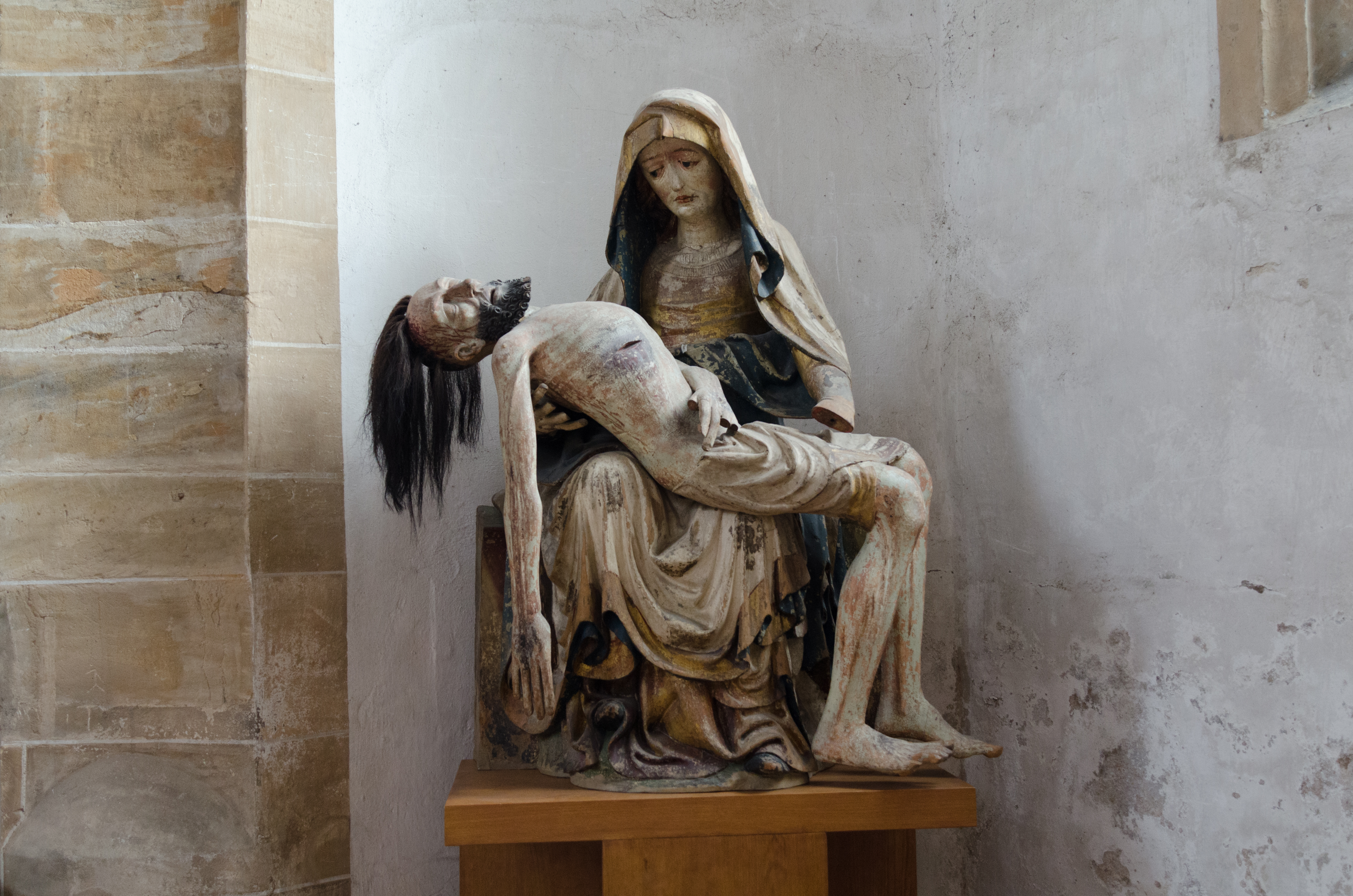 Pietà im Freiberger Dom